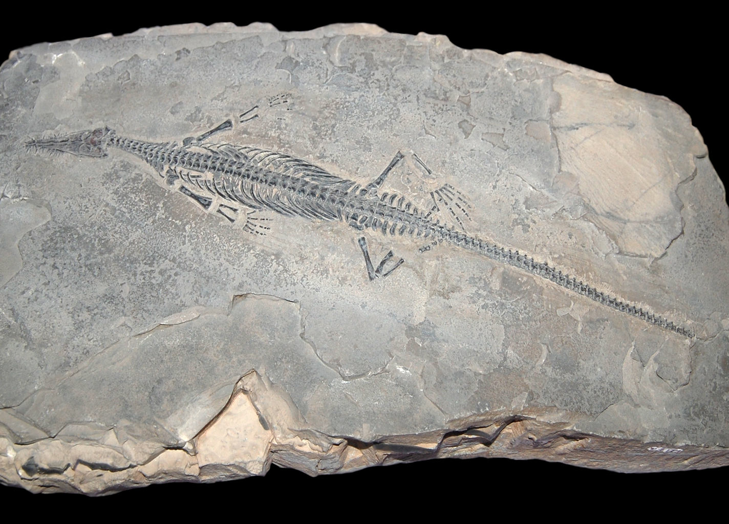 Museo civico di storia naturale Milano